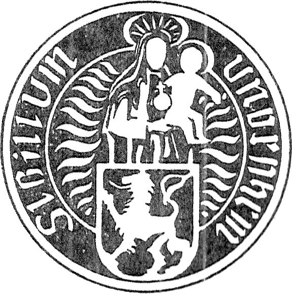 Gerichtssiegel der Gemeinde Undenheim aus dem 18. Jahrhundert. Es zeigt einen Schild mit dem schreitenden pfälzischen Löwen (hiermit wird die Zugehörigkeit zur Pfalz zum Ausdruck gebracht), hinter dem Schild stehend, umgeben von einem strahlenden Flammenkranz, als Schildhalterin Maria mit Jesus auf dem Arm, welcher die Weltkugel mit Kreuz in der Hand hält. Die Inschricft lautet: Sigilum Undenheim